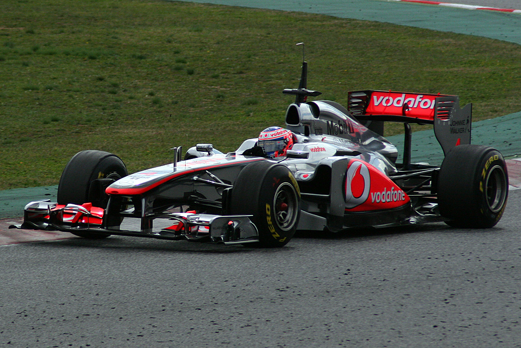 Jenson Button